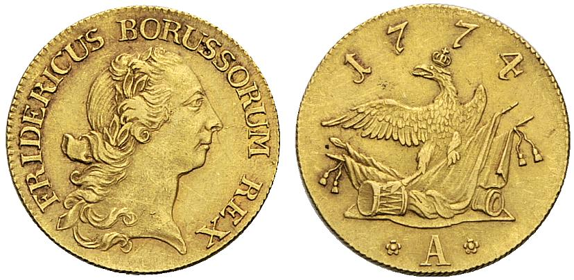 Münze Gold: Friedrich d'or, Friedrich II., 1774, Münzstätte "A" Berlin